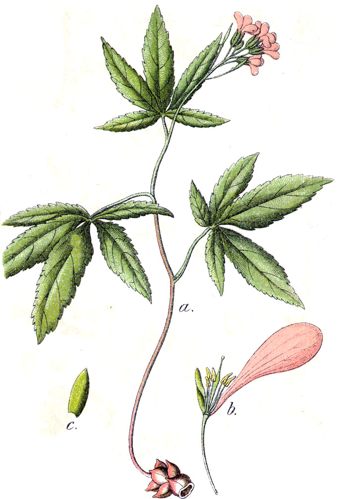 Cardamine pentaphyllos (L.) Crantz., syn. Crucifera pentaphylla E.H.L.Krause Original Description "Fünfblättrige Zahnwurz", Crucifera pentaphylla